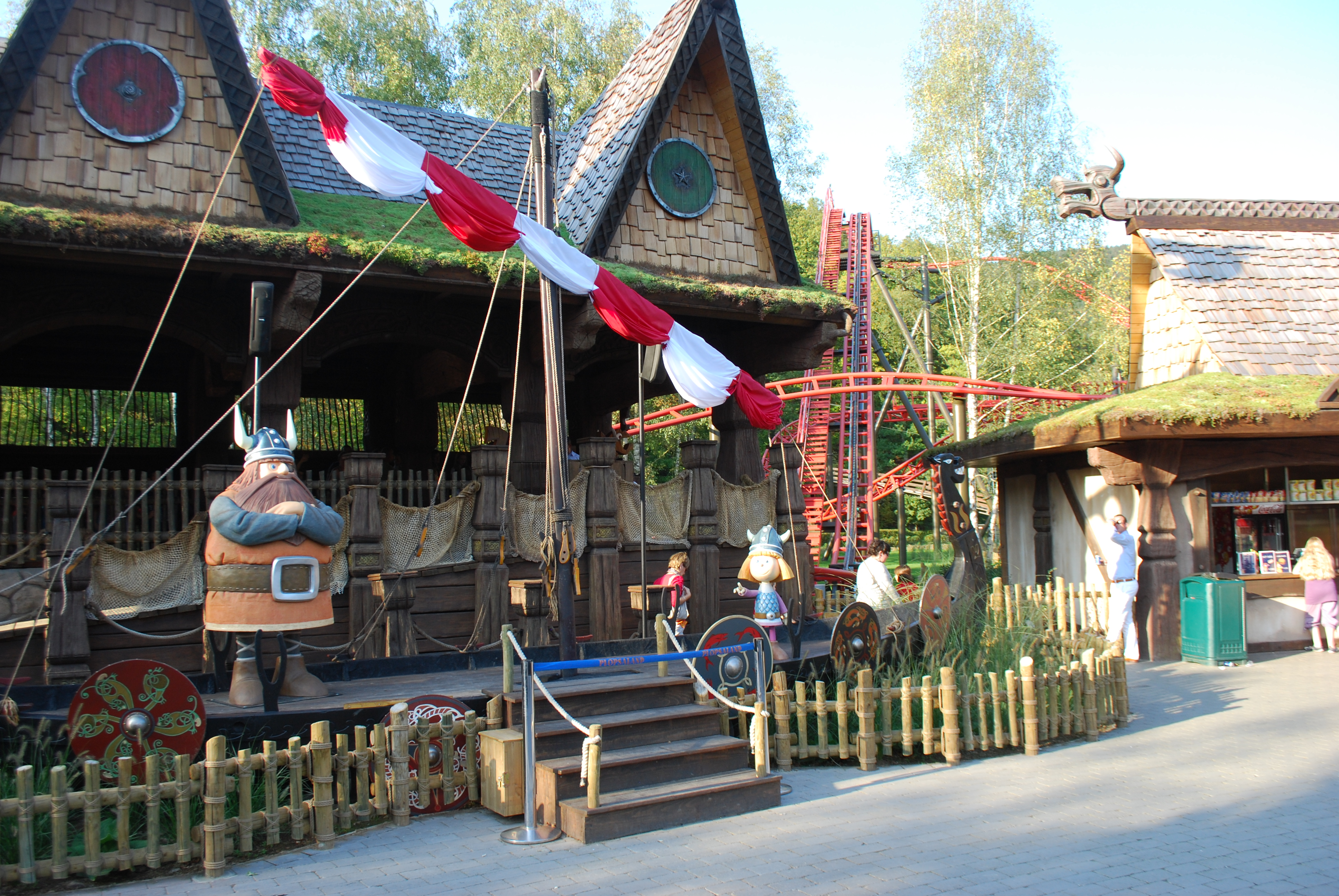 Vue de l'attraction "Vicky the Ride", au parc Plopsa Coo à Stavelot.